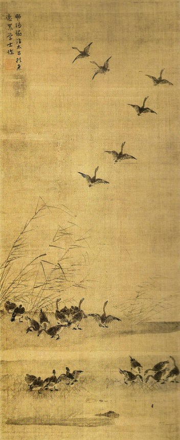 Les Oies sauvages est une œuvre du peintre japonais Tokusai Tesshū du XIVe siècle. C'est une encre sur papier de 111,4x44,5 centimètres. Elle est conservée au Metropolitan Museum de New York.